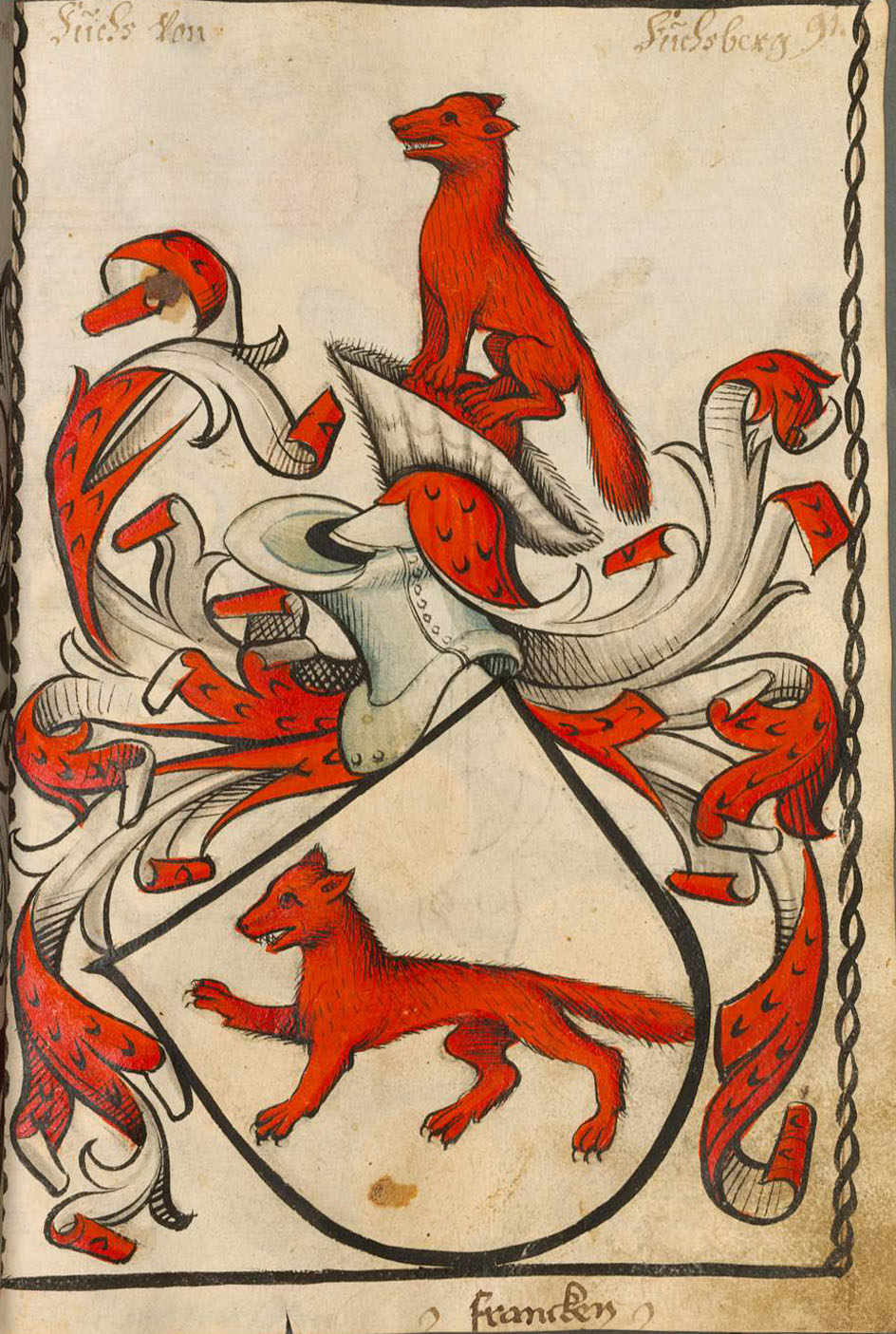 Scheibler'sches Wappenbuch , älterer Teil Fuchs von Fuchsberg Franken